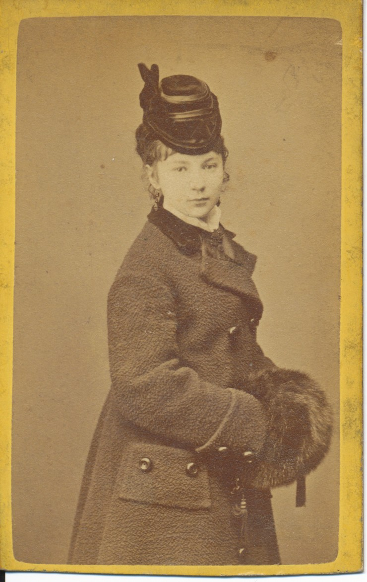 Helena Kraińska ok. 1870 r.